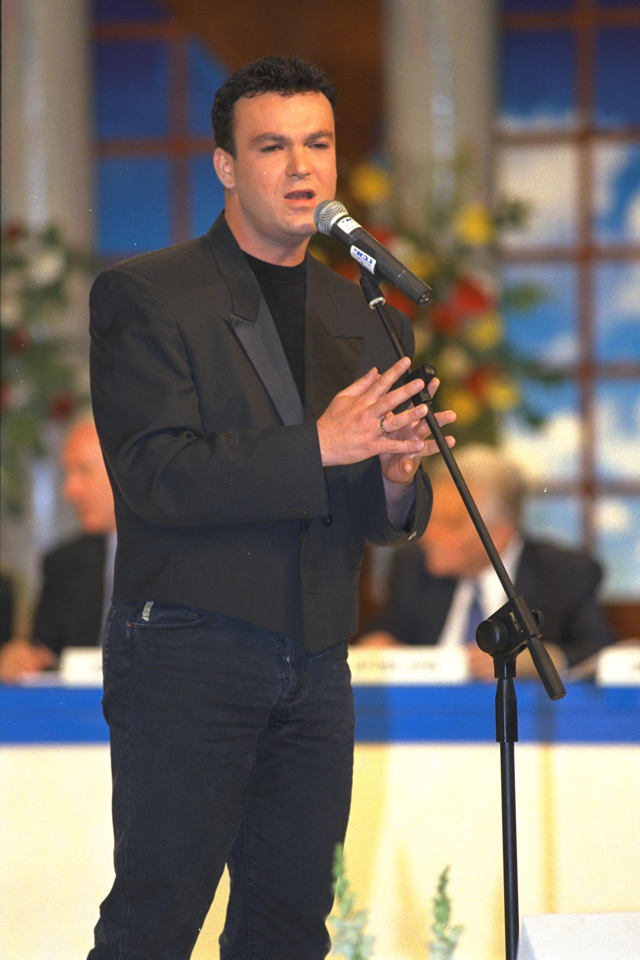 Singer David Deor at the Israel Prize Ceremony held at the Jerusalem Theatre, on the 49th Independce Day of Israel. דוד דאור מופיע בטקס פרס ישראל הנערך בתיאטרון ירושלים ביום העצמאות ה-49 של מדינת ישראל Photo: AMOS BEN GERSHOM, 05/12/1997